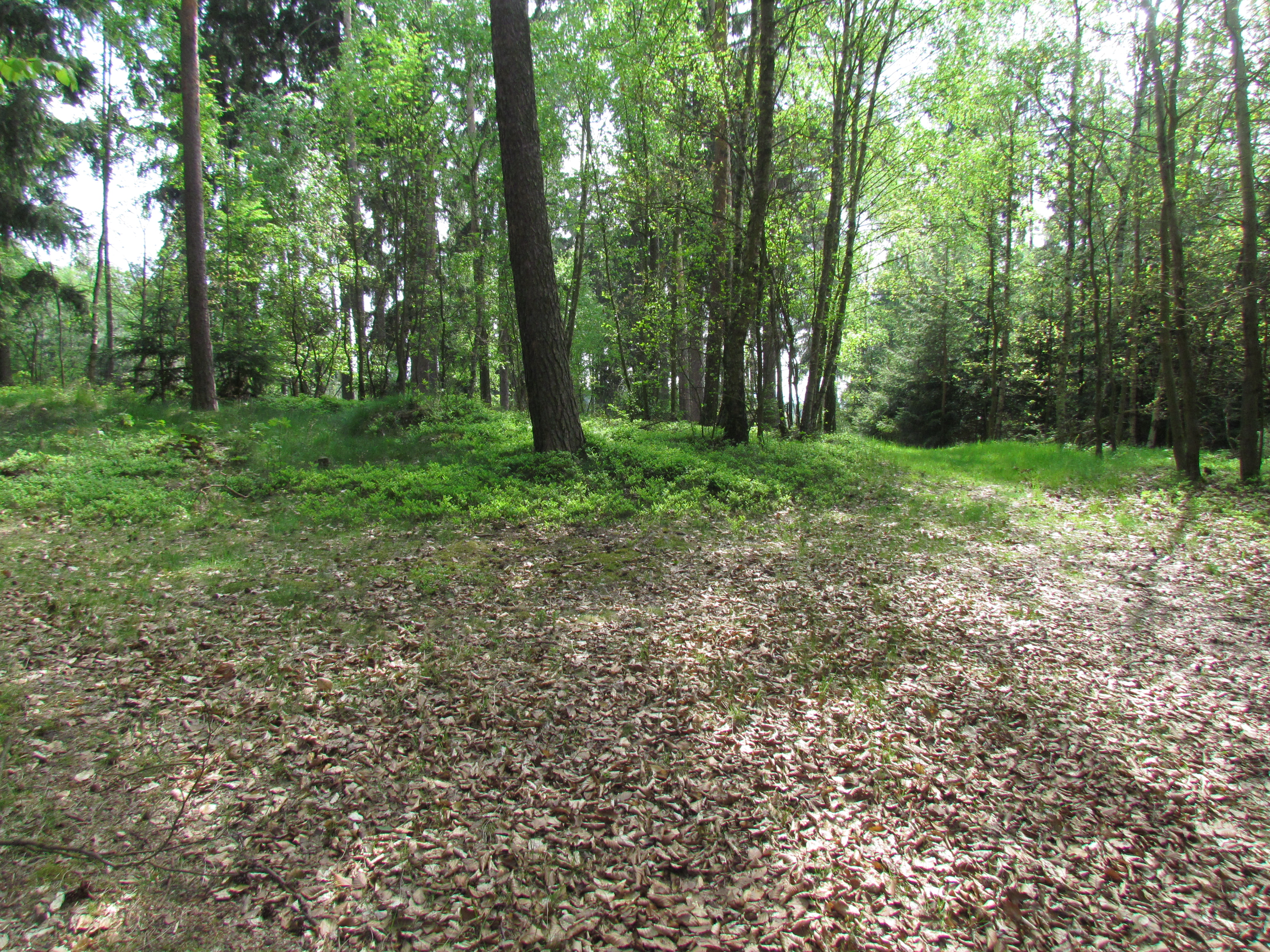 Vrchol Holého vrchu